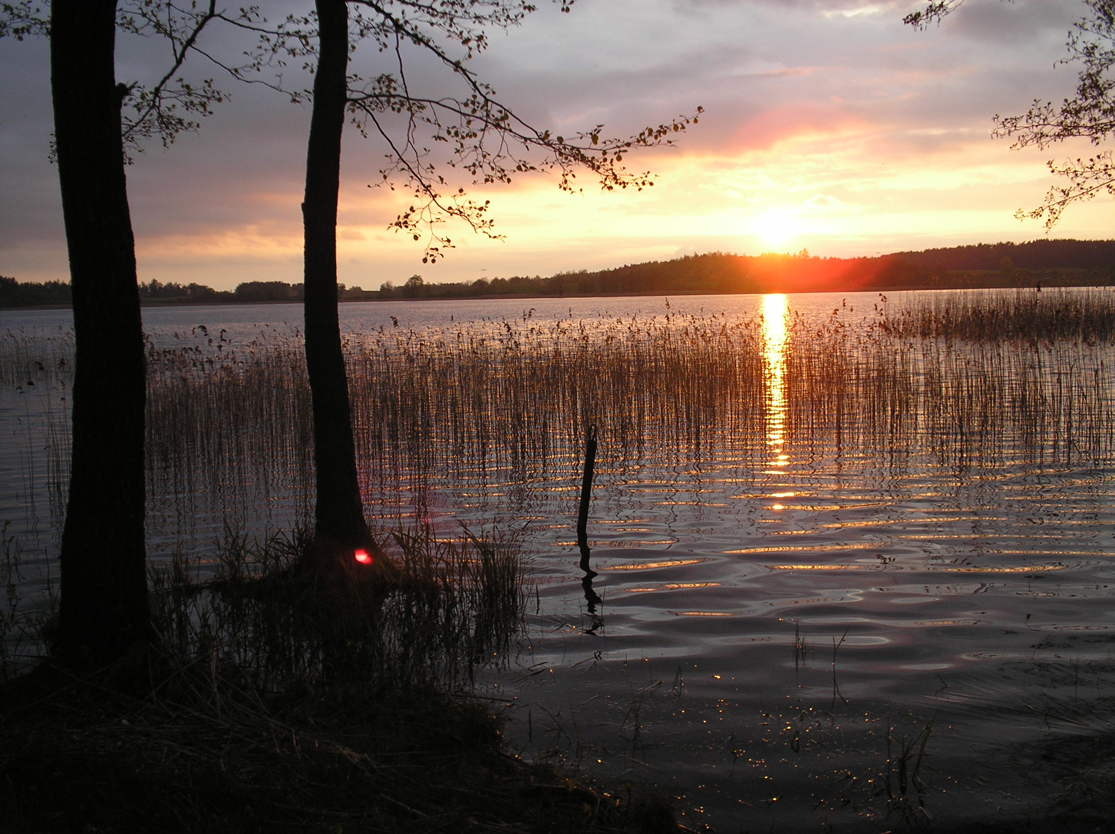 Jezioro Dybowskie położone na Pojezierzu Ełckim